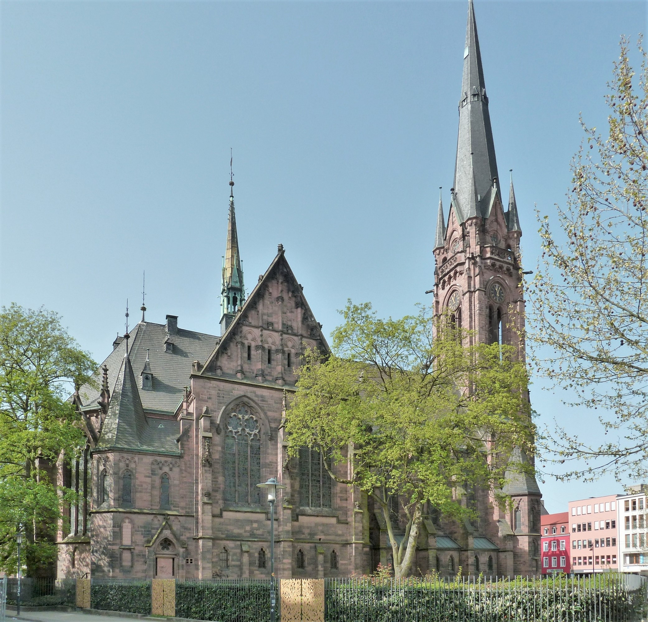 Die Nordostfassade der Johanneskirche Saarbrücken.